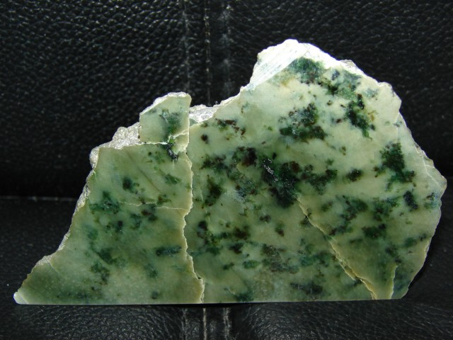 Nefryt Polska.